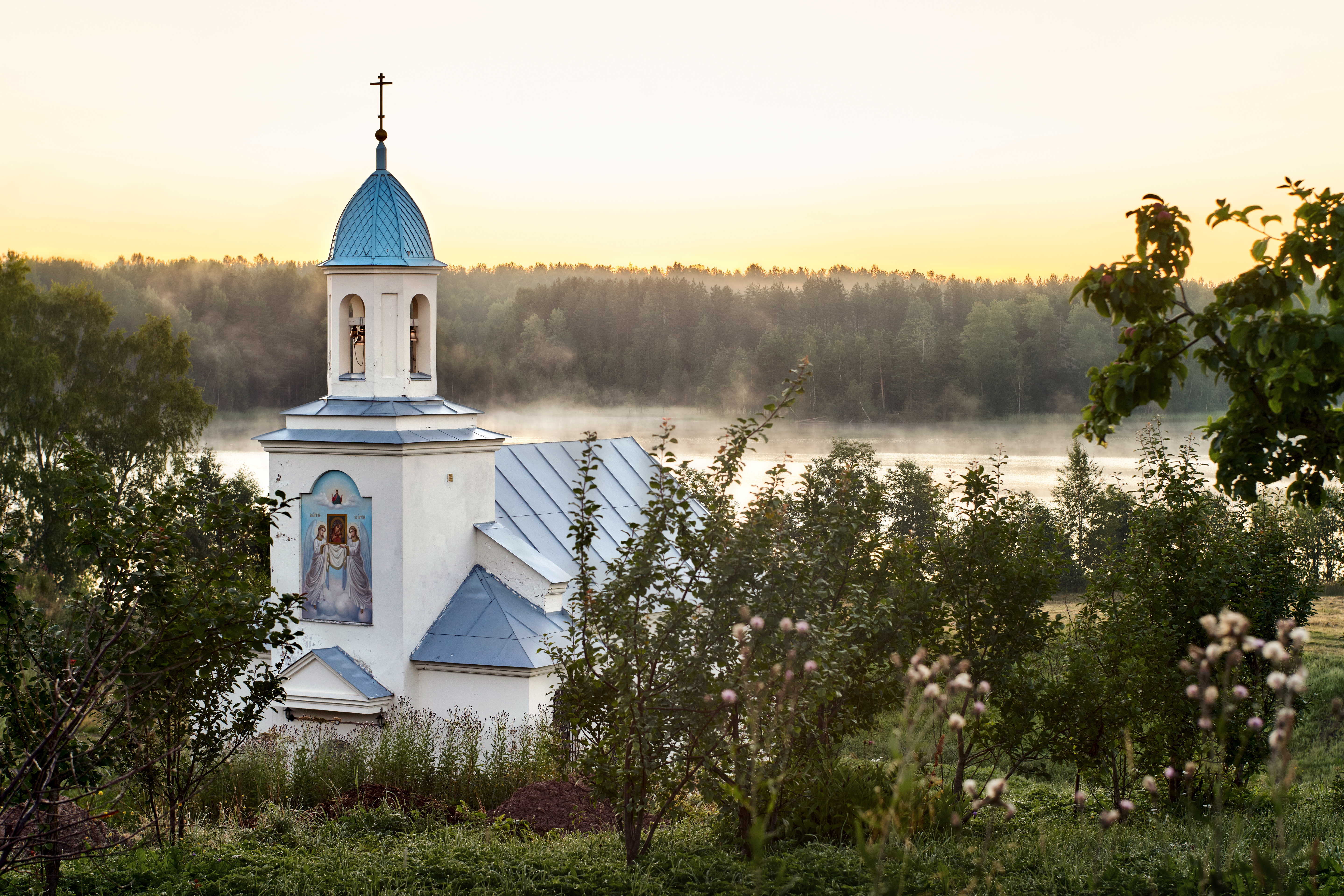 Покровский Тервенический женский монастырь, село Тервиничи тихвинского района ЛО.